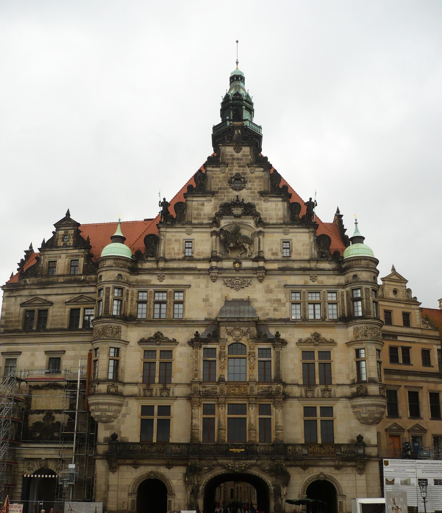 Drezno. Zamek